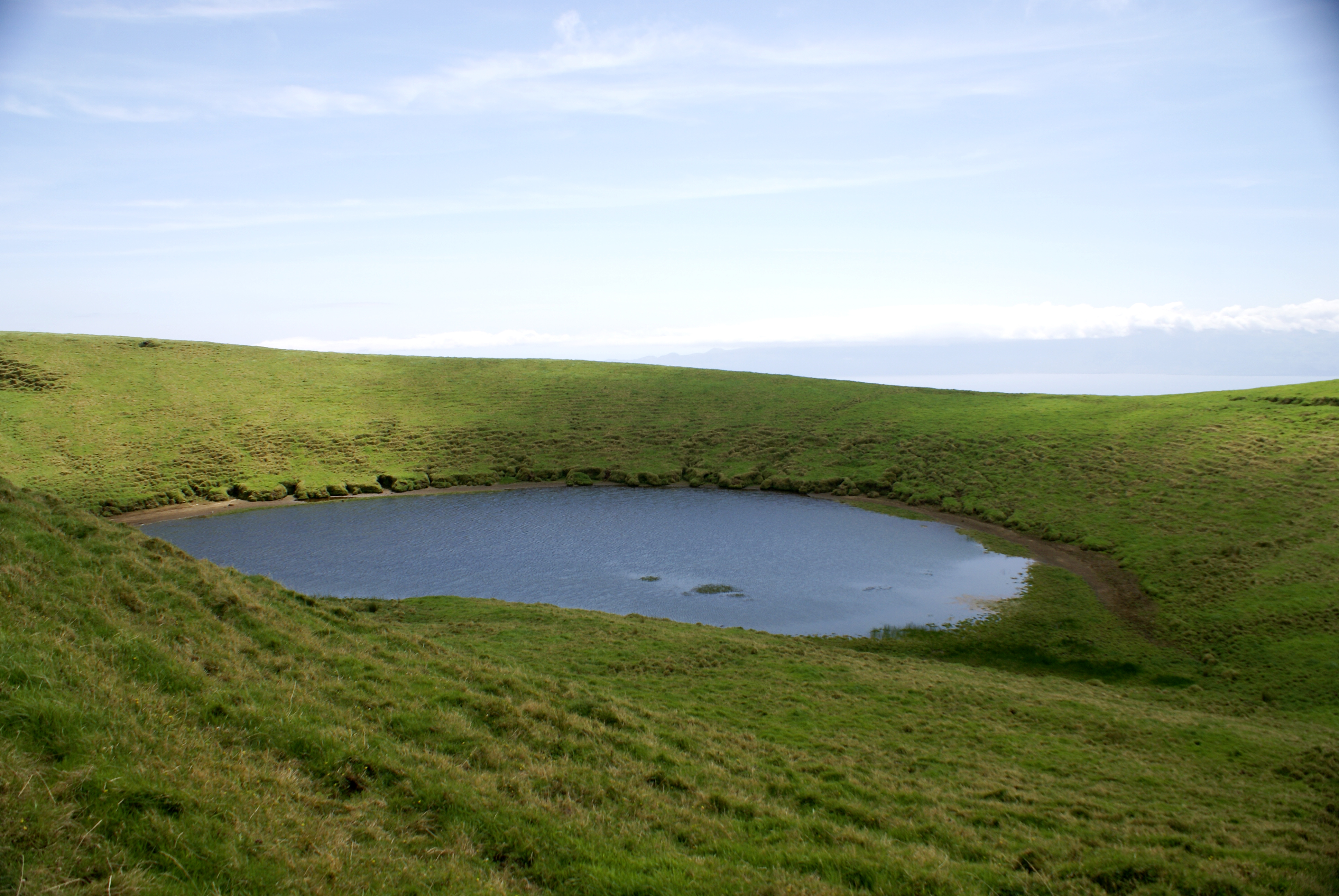 Lagoa do Pico Pinheiro, Norte Grande, Calheta, ilha de São Jorge, Açores